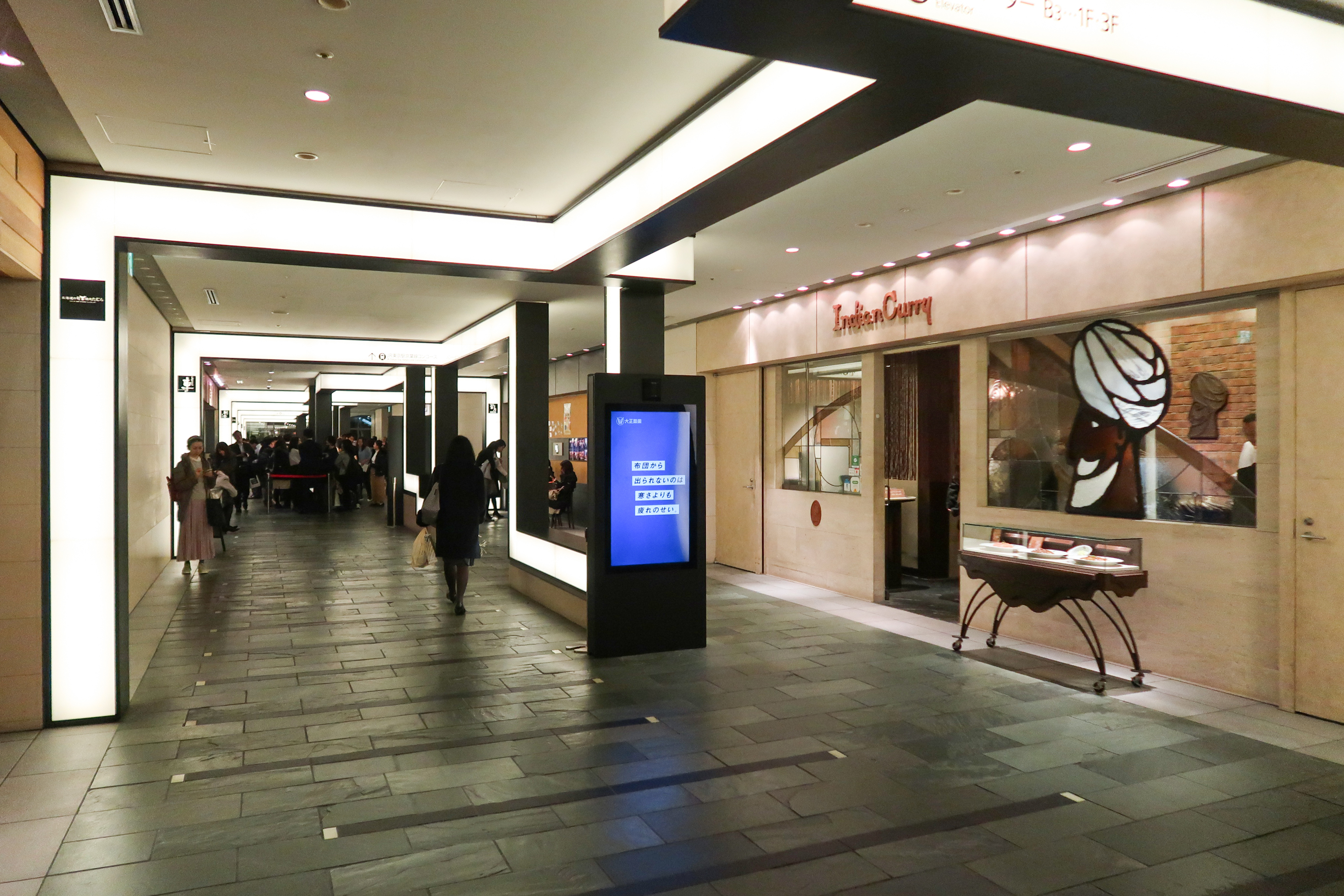 Tokyo Building Basement restaurants